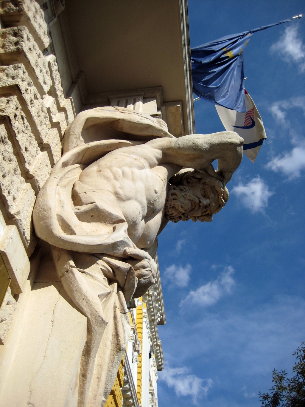 detalj na ulazu u zgradu Jadrolinije